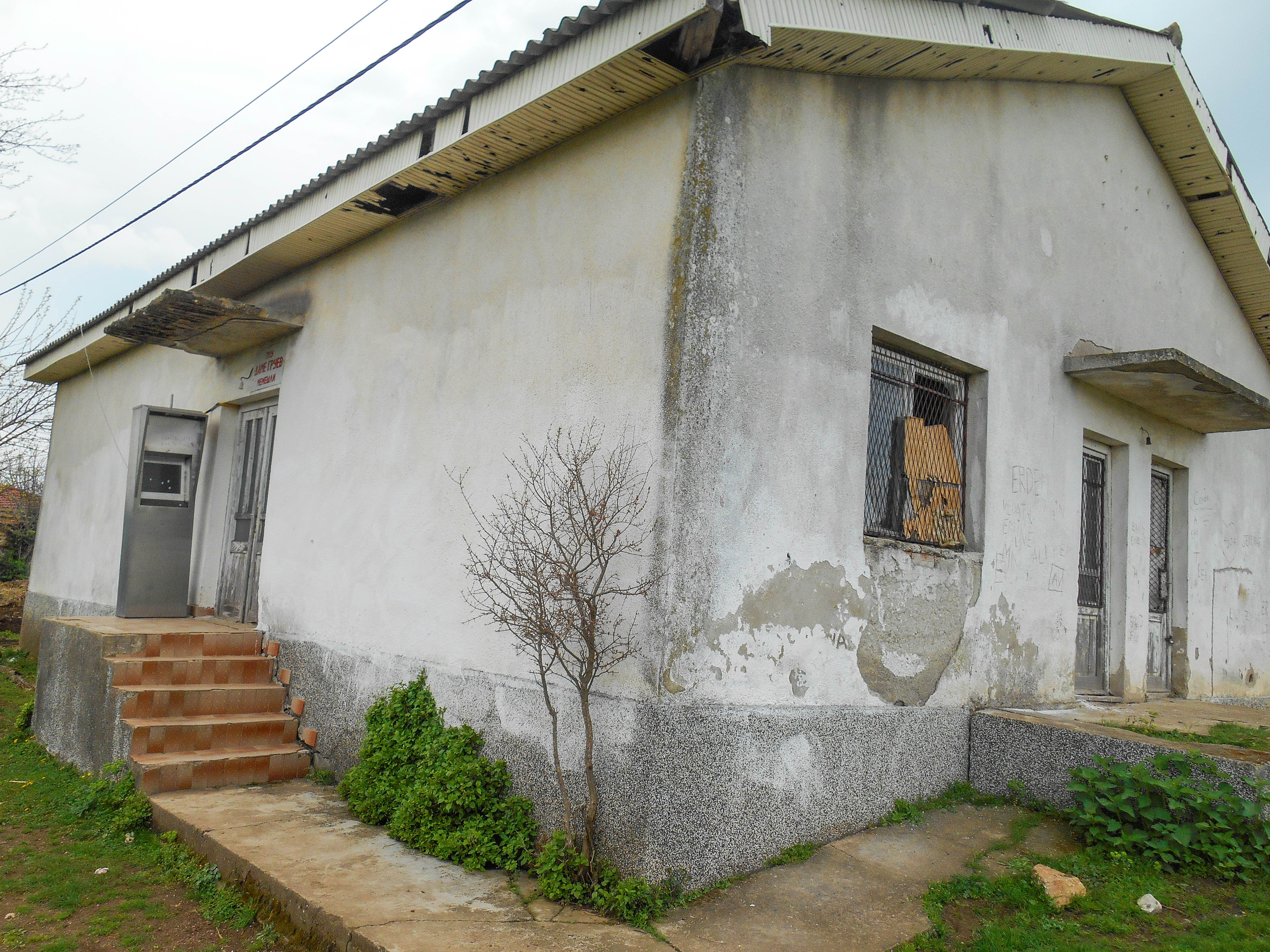 Училиште Даме Груев